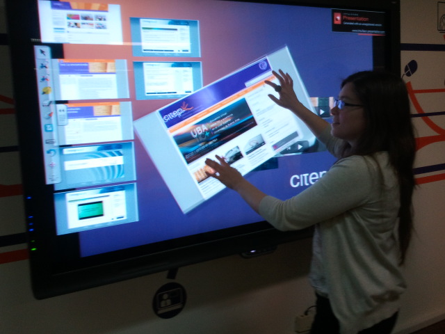 Demostración de uso de la pantalla interactiva del aula tecnológica